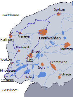 Traject Elfstedentocht, met aanduiding van de plaatsnamen. De plaatsen waar de deelnemers door moeten schaatsen zijn onderstreept.